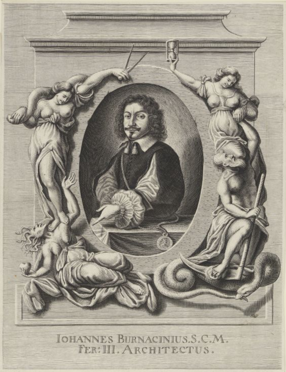 Bildnis des Theaterarchitekten und Bühnenbildners Giovanni Burnacini (1610-1655) aus 1653